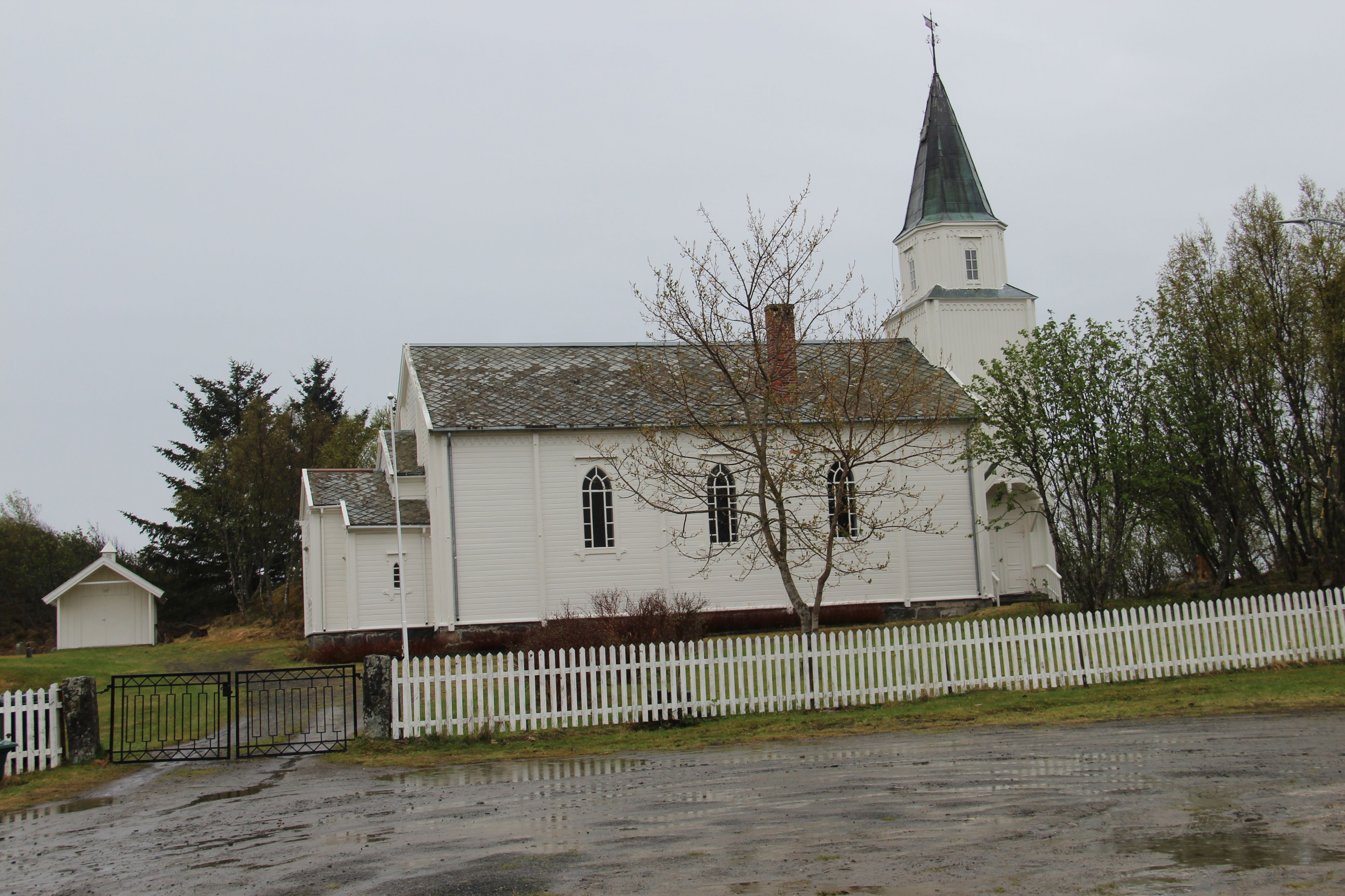 Vestbygd kirke, Vågehamn. Foto: Bertha Elisabeth Aarø, fra Riksantikvarens Kulturminnesøk.